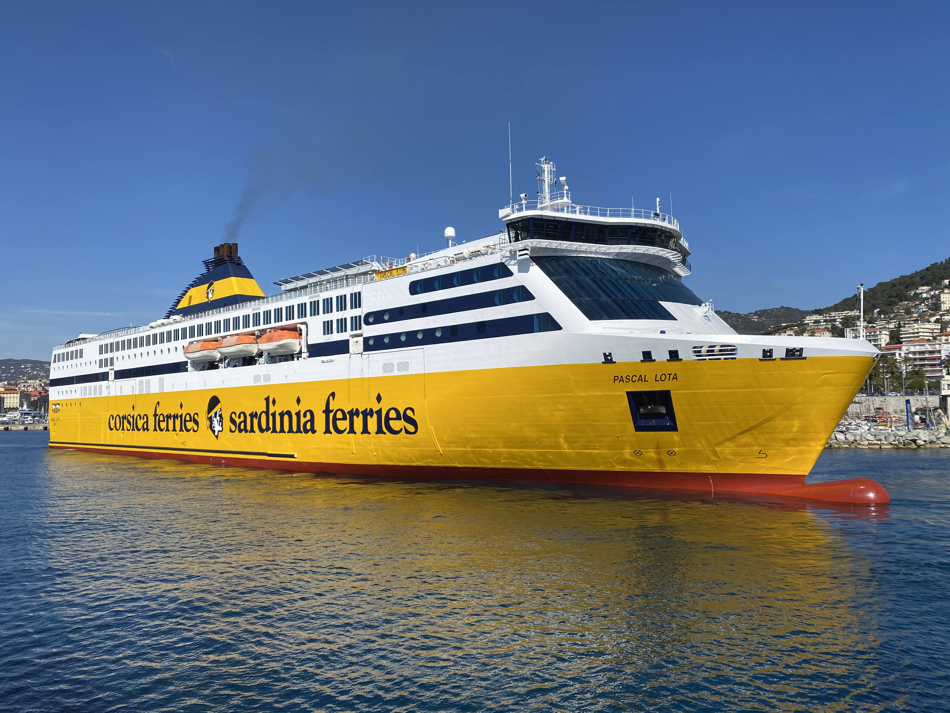 Le car-ferry Pascal Lota de la compagnie Corsica Ferries à Nice en février 2020.